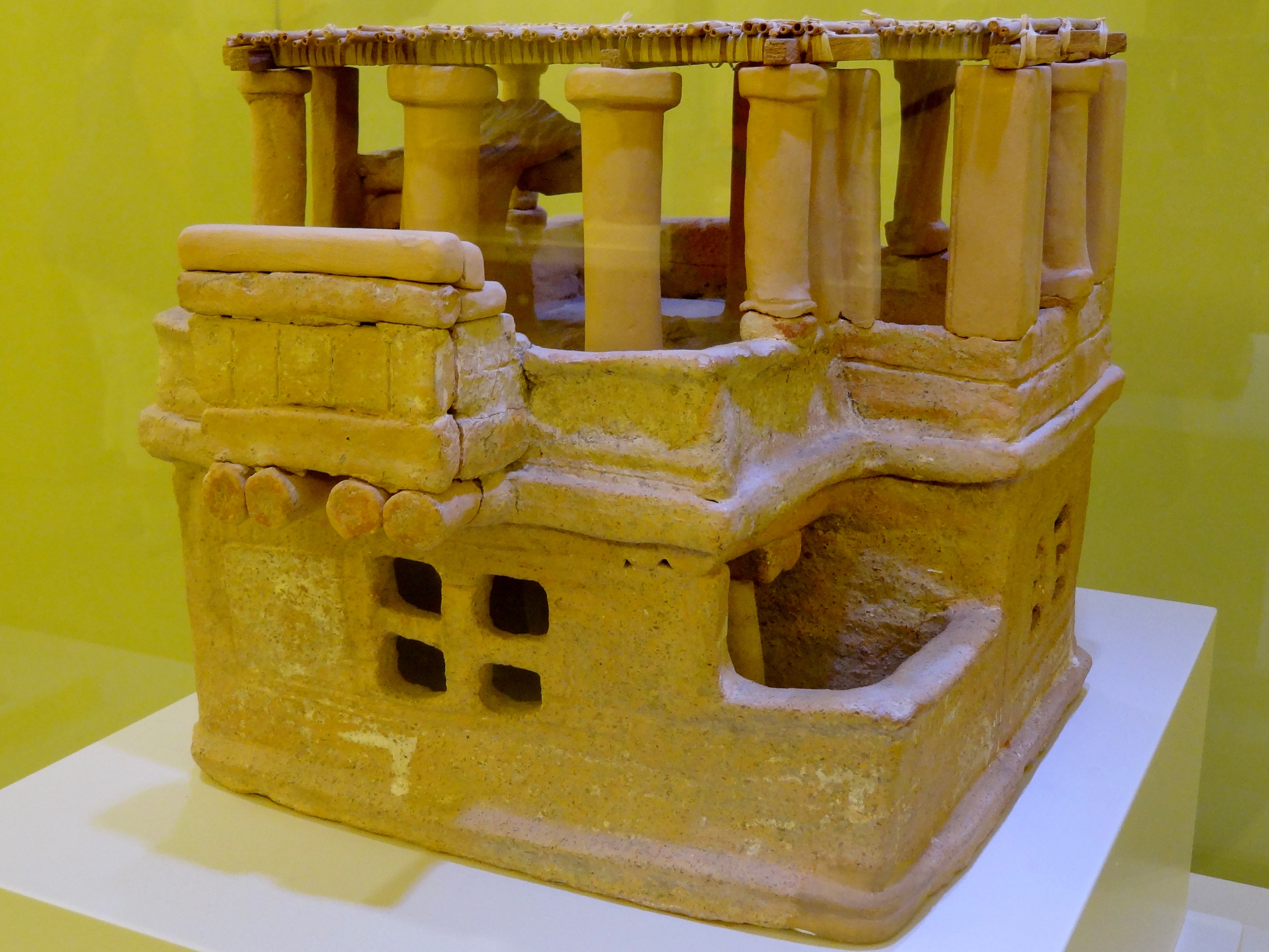 Tonmodell eines minoischen Hauses (Neupalastzeit, um 1600 v. Chr.) aus Archanes, ausgestellt im Archäologischen Museum Iraklio, Kreta, Griechenland